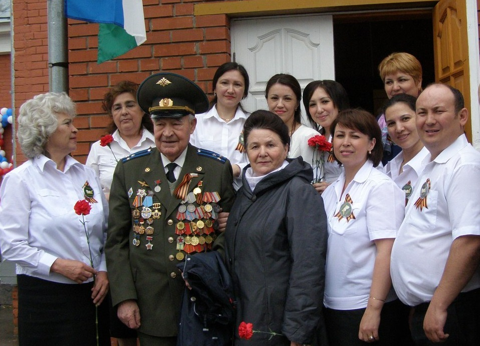 Писатели Азат Магазов и Гузаль Ситдыкова с работниками Дома-музея им. М. Гафури. 2014. Уфа